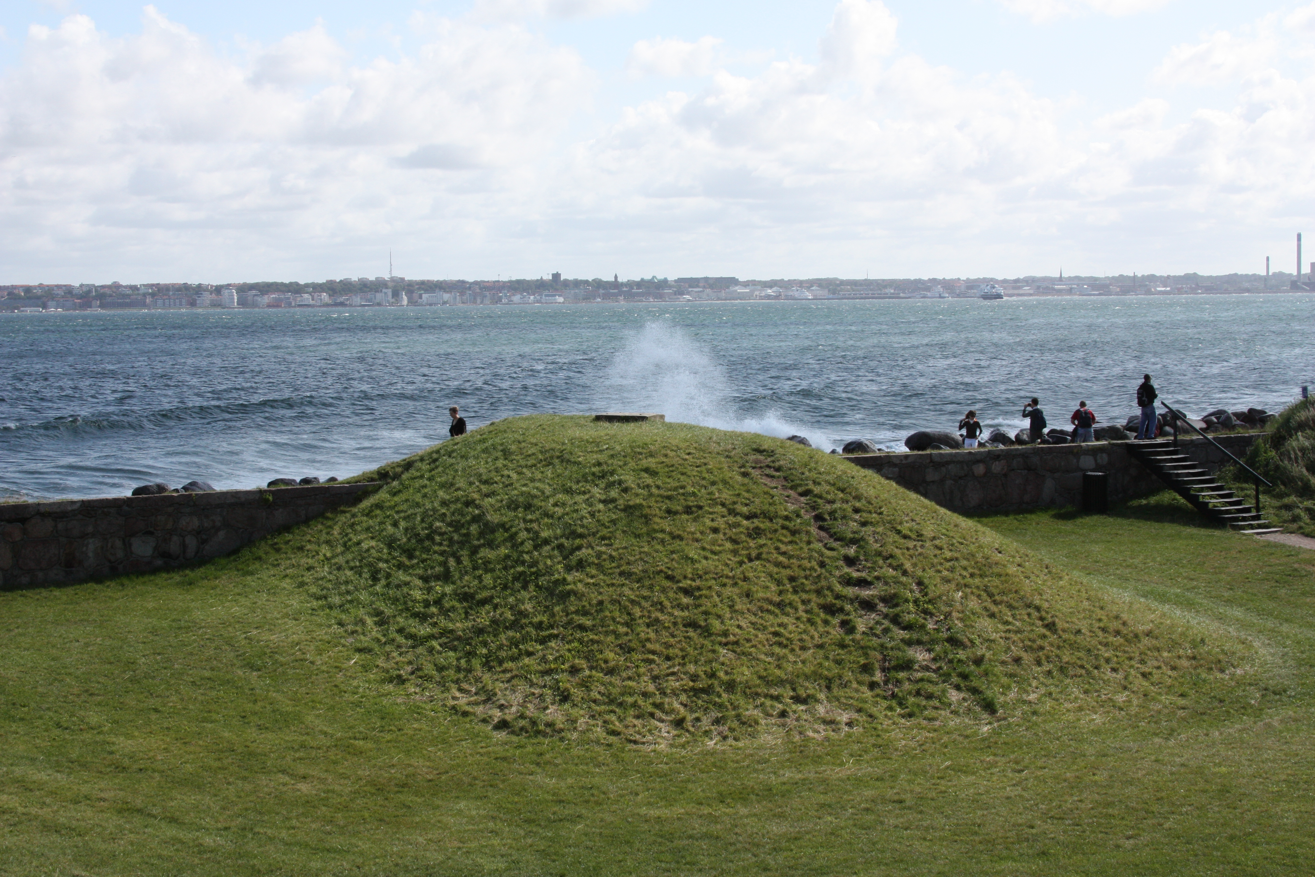 August 2009